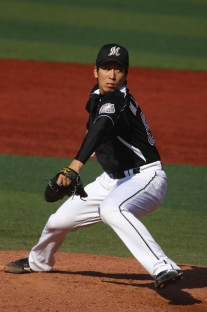 日本プロ野球 千葉ロッテマリーンズ 益田直也 投手 背番号52